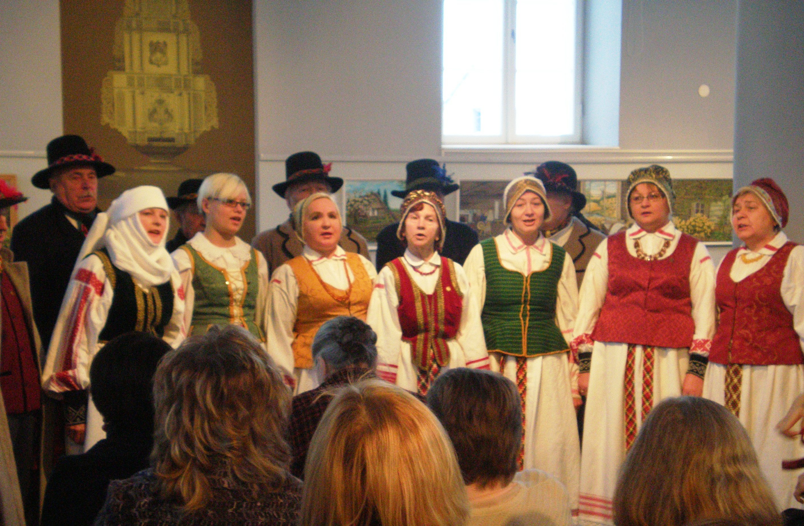 Kėdainių kultūros centro folkloro ansamblis "JORIJA"